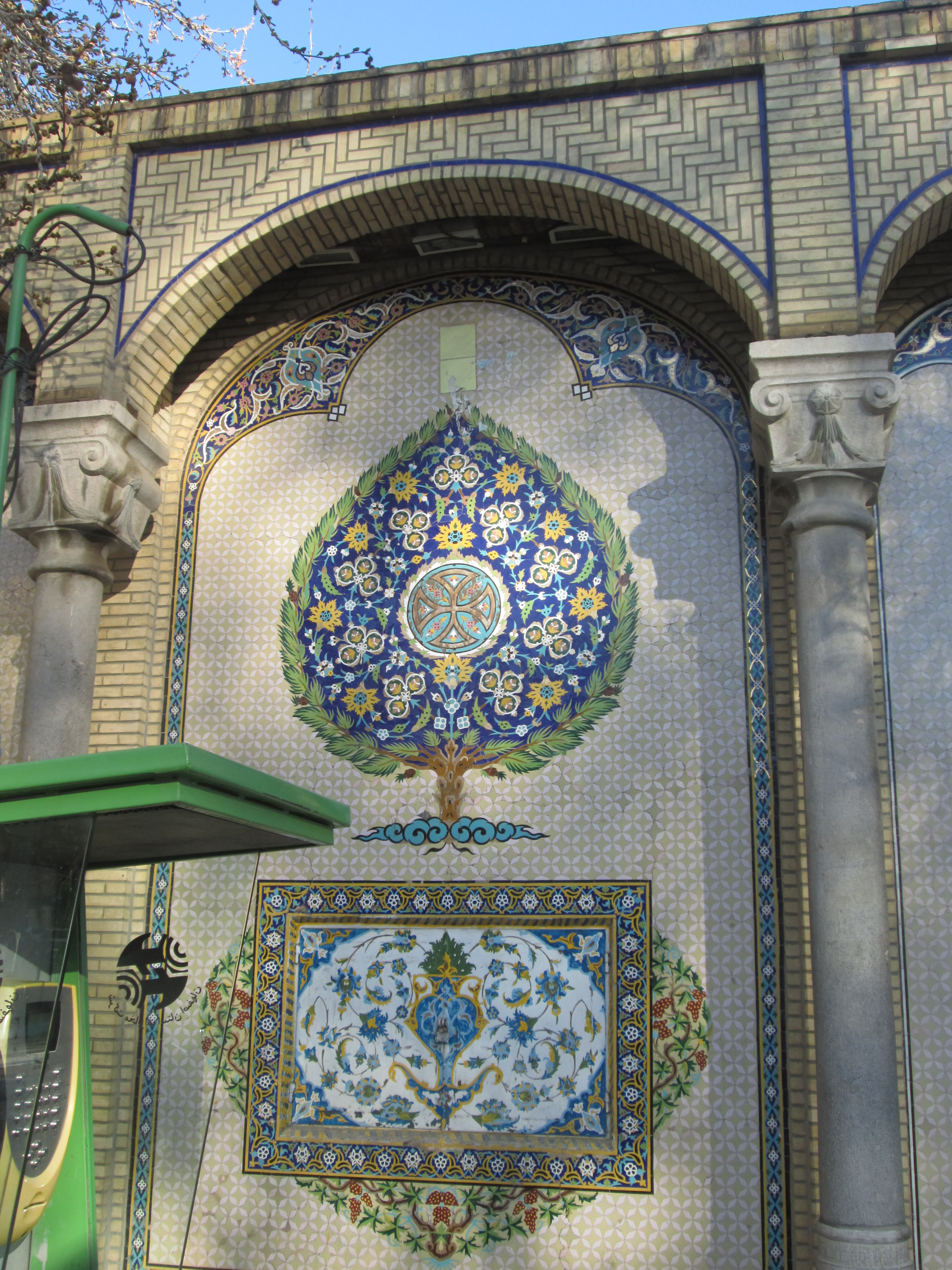 کاشیکاریهای استاد عیسی بهادری، در نبش چهارراه عباس آباد که شوربختانه با گذاشتن اتاقک تلفن و صندوق صدقات در روبروی آن چهره‌ی آنرا نازیبا کرده‌اند. این کاسی‌کاری آمیزه‌ای از هنر اسلامی-مسیحی و ایرانی-انگلیسی است.